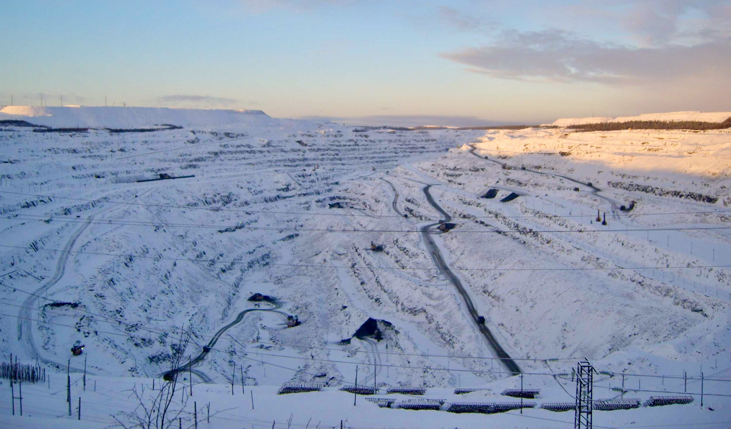 Центральный карьер Костомукшского ГОКа (Карельский окатыш, Северсталь)